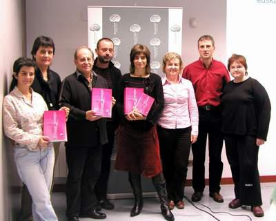 Elhuyar Hiztegiaren 4. argitalpenaren aurkepen-ekitaldia.